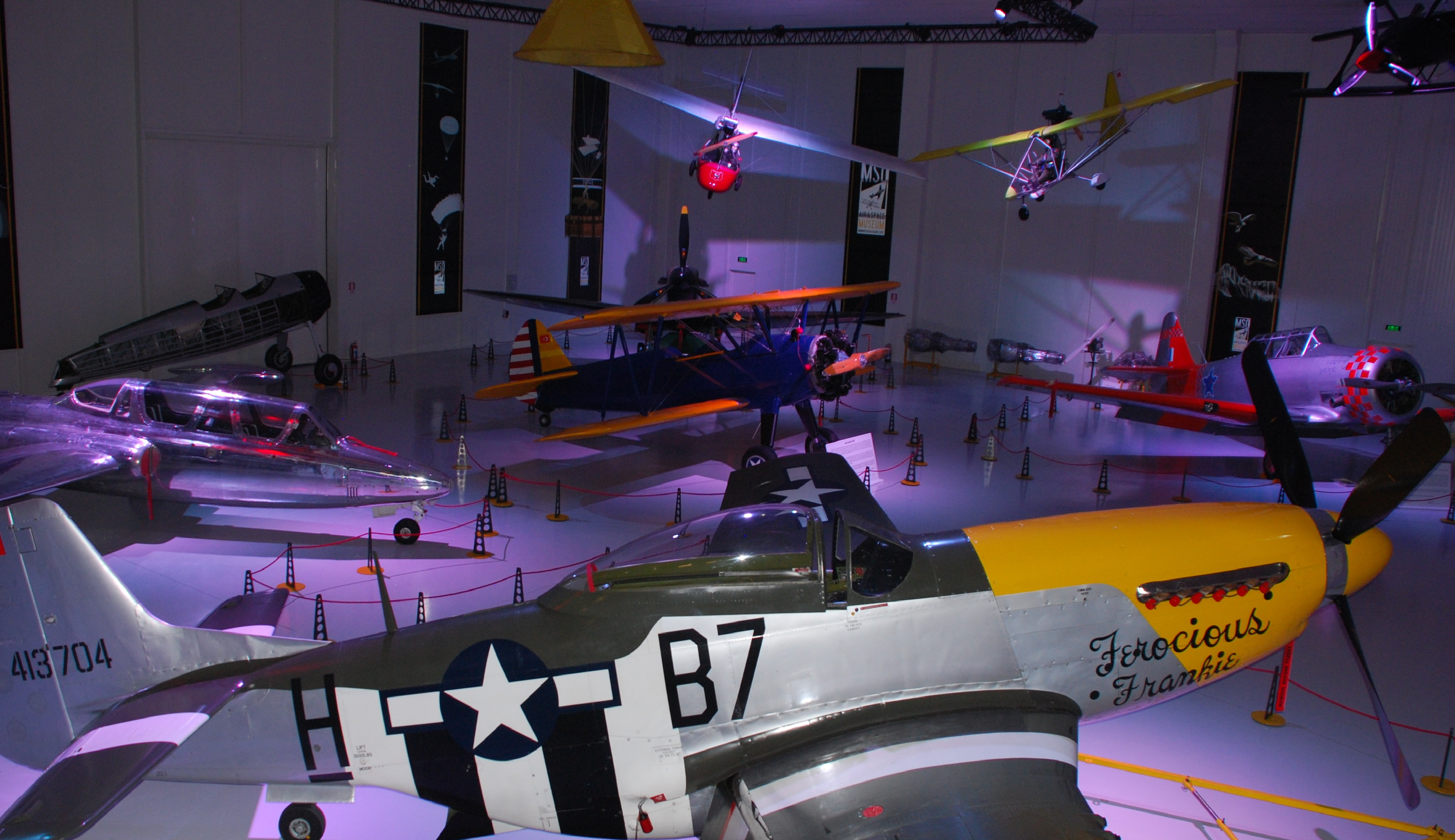 M.S.Ö. Hava ve Uzay Müzesi Pazartesi günleri hariç haftanın 6 günü 10:00-17:00 saatleri arasında ziyarete açıktır.